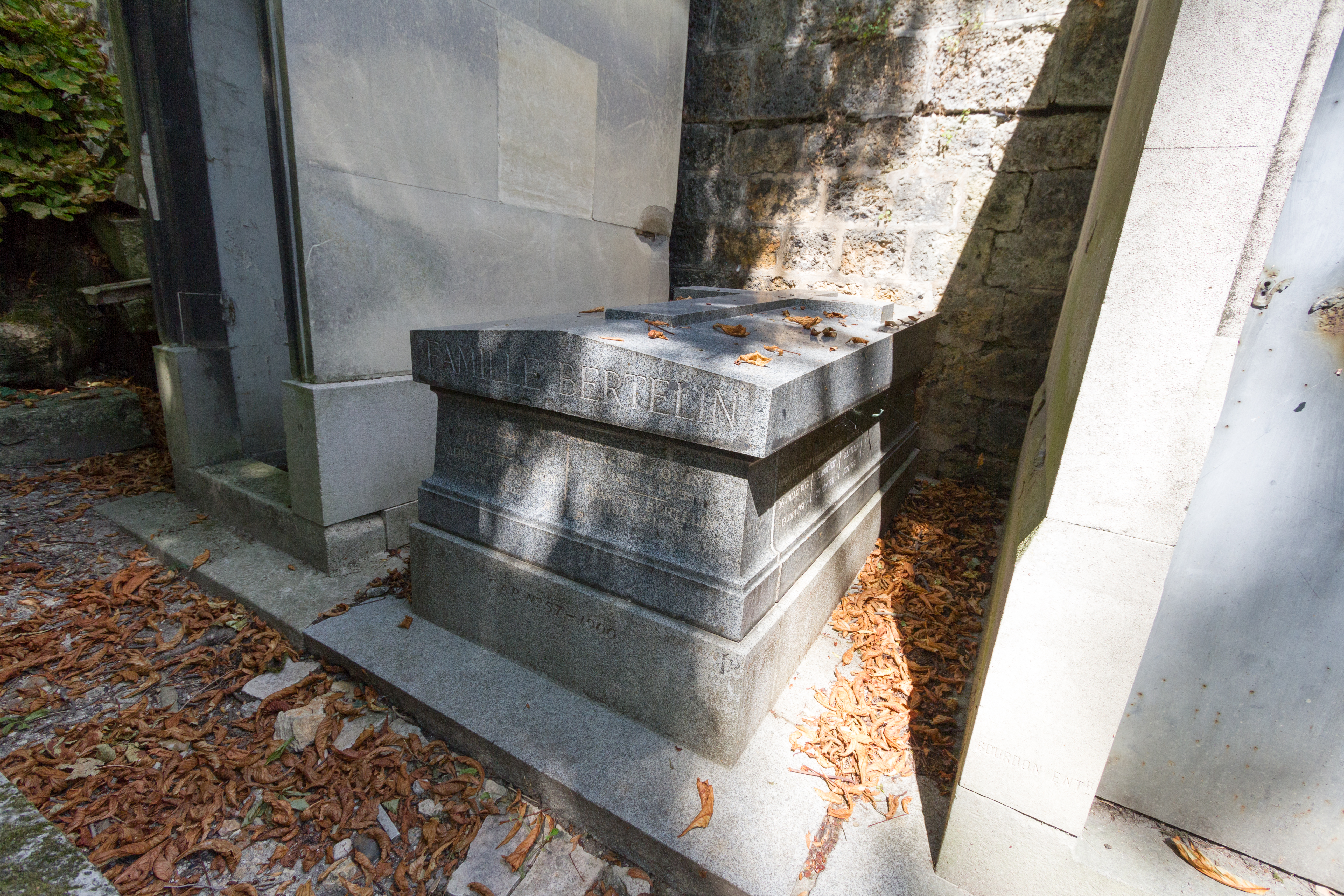 Sépulture de Marcel Bertelin (1877-1914), capitaine de chasseurs à cheval ; Léon-François Bertelin (1841-1914), banquier ; Albert Bertelin (1872-1951), compositeur.